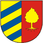 znak obce